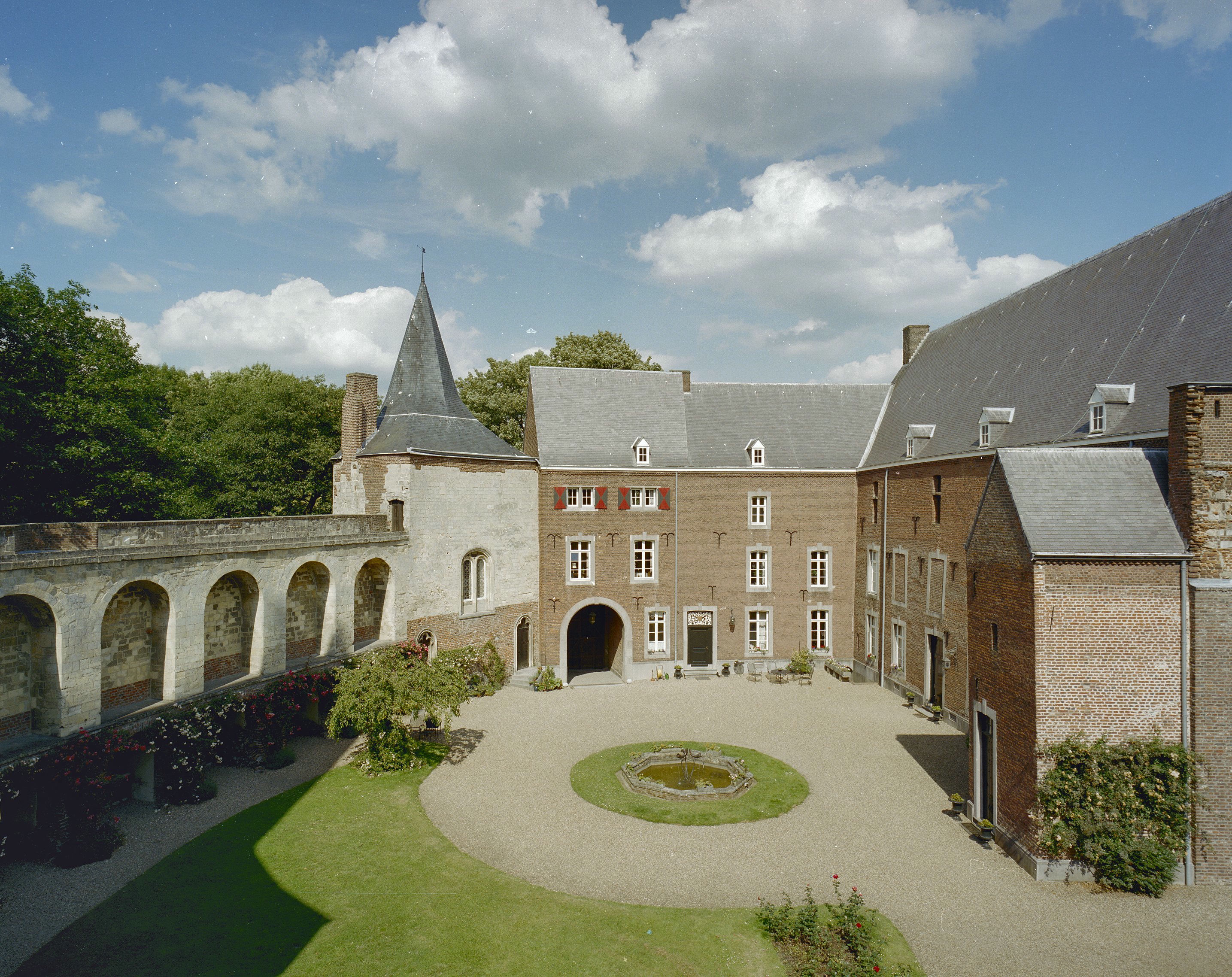 Buitenplaats Horn: Overzicht van de binnenplaats met de ringmuur met spaarbogen en een hoektoren en de twee vleugels van het kasteel (opmerking: Gefotografeerd voor Kastelen in Limburg (1000-1800), Burchten en landhuizen)